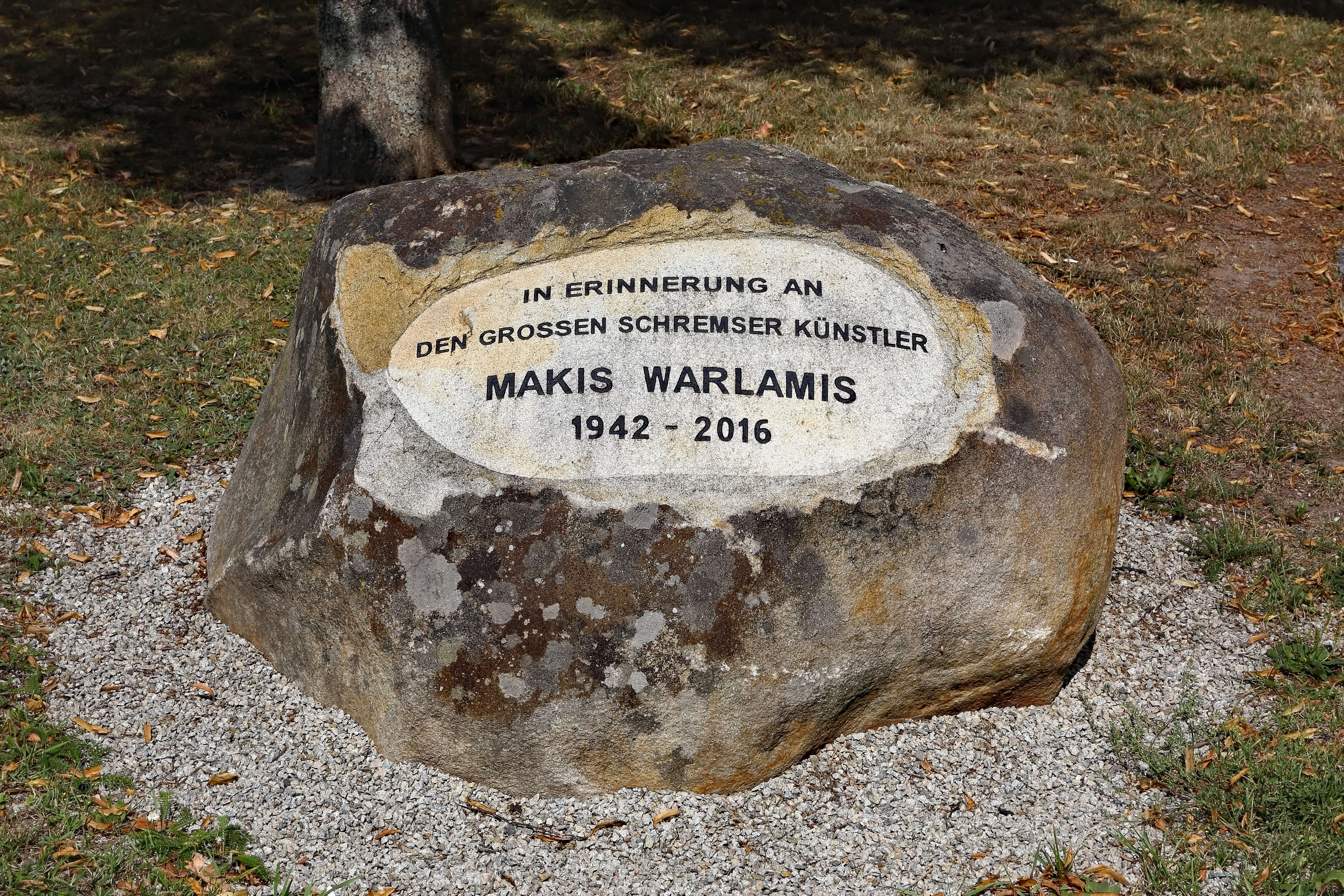 Gedenkstein für Makis Warlamis, den 1916 verstorbenen griechisch-österreichischer Architekt, Maler, Designer, Dichter, Schriftsteller, Pädagoge und Museumsgründer am Hauptplatz in Schrems.